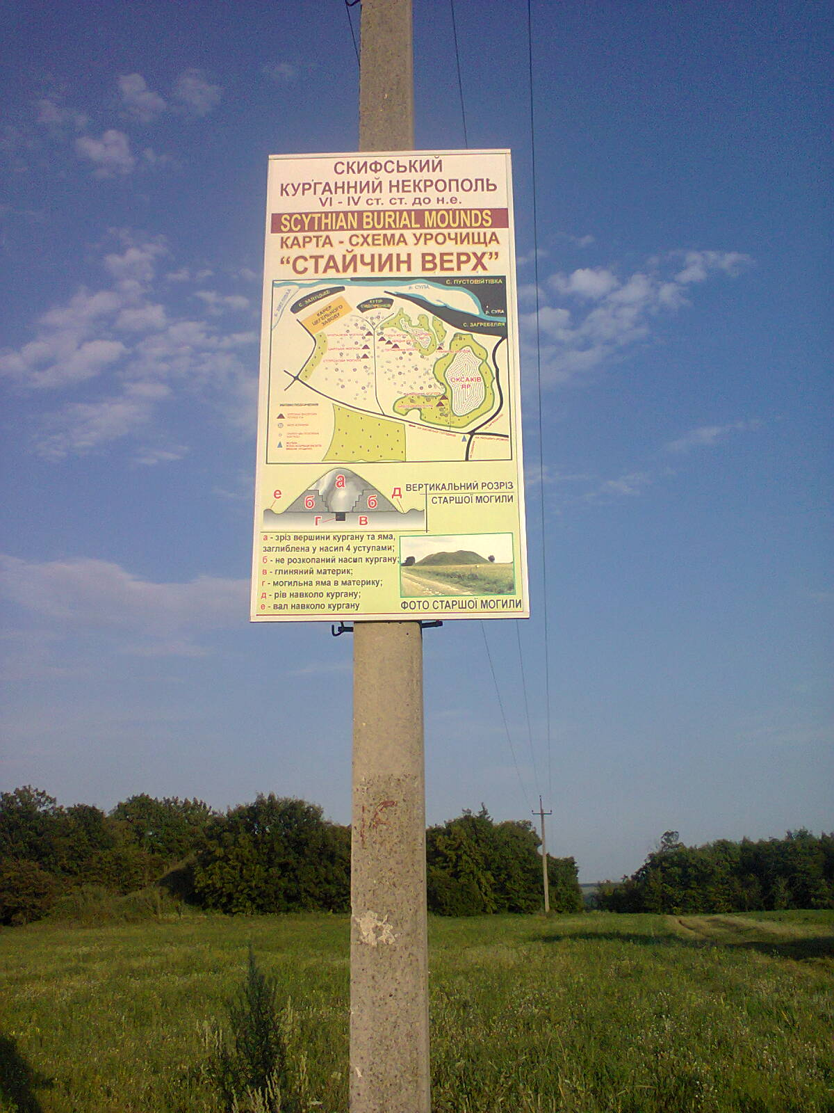 «Оксютинські кургани», Роменський р-н: Над правим корінним берегом р. Сула на території Плавинищенської (в урочищі «Стайчин Верх») та Басівської сільських рад